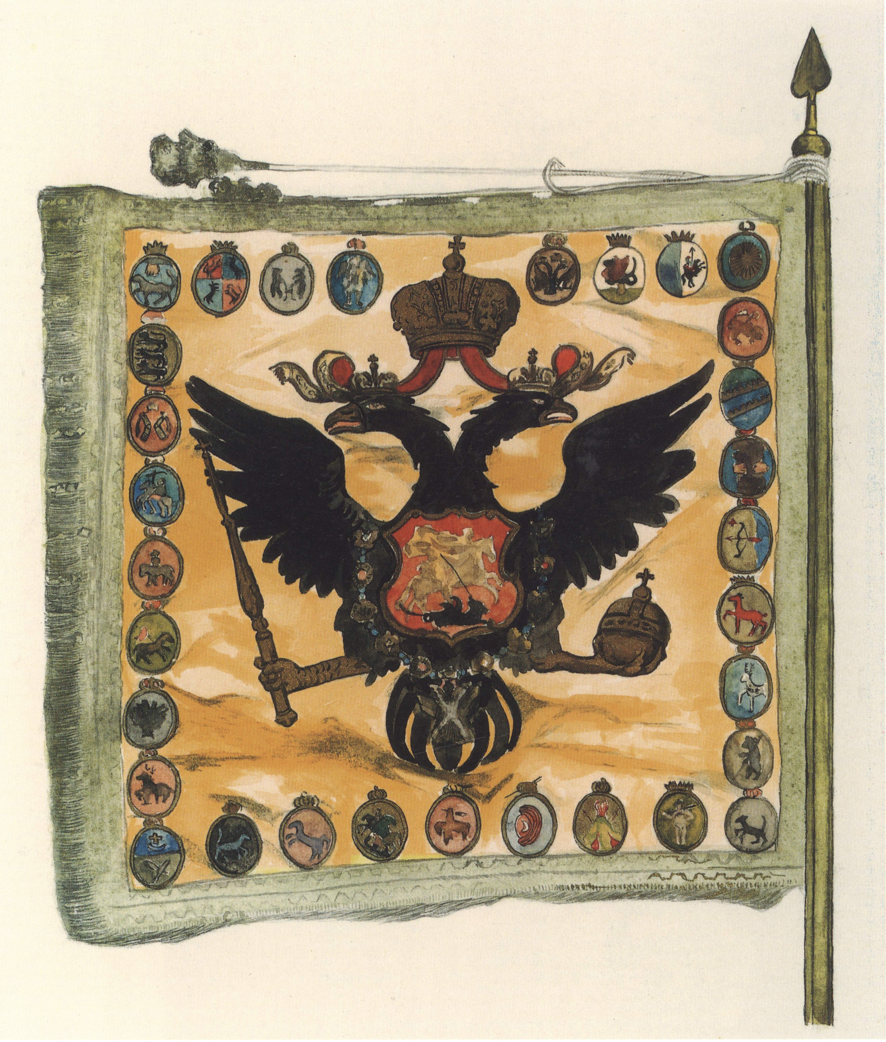 Рисунок государственного знамени (Панира). 1742 г. Государственный Эрмитаж. (Вилинбахов Г.В. Государственный герб России. 500 лет. СПб.: АО «Славия», 1997. - с.87)